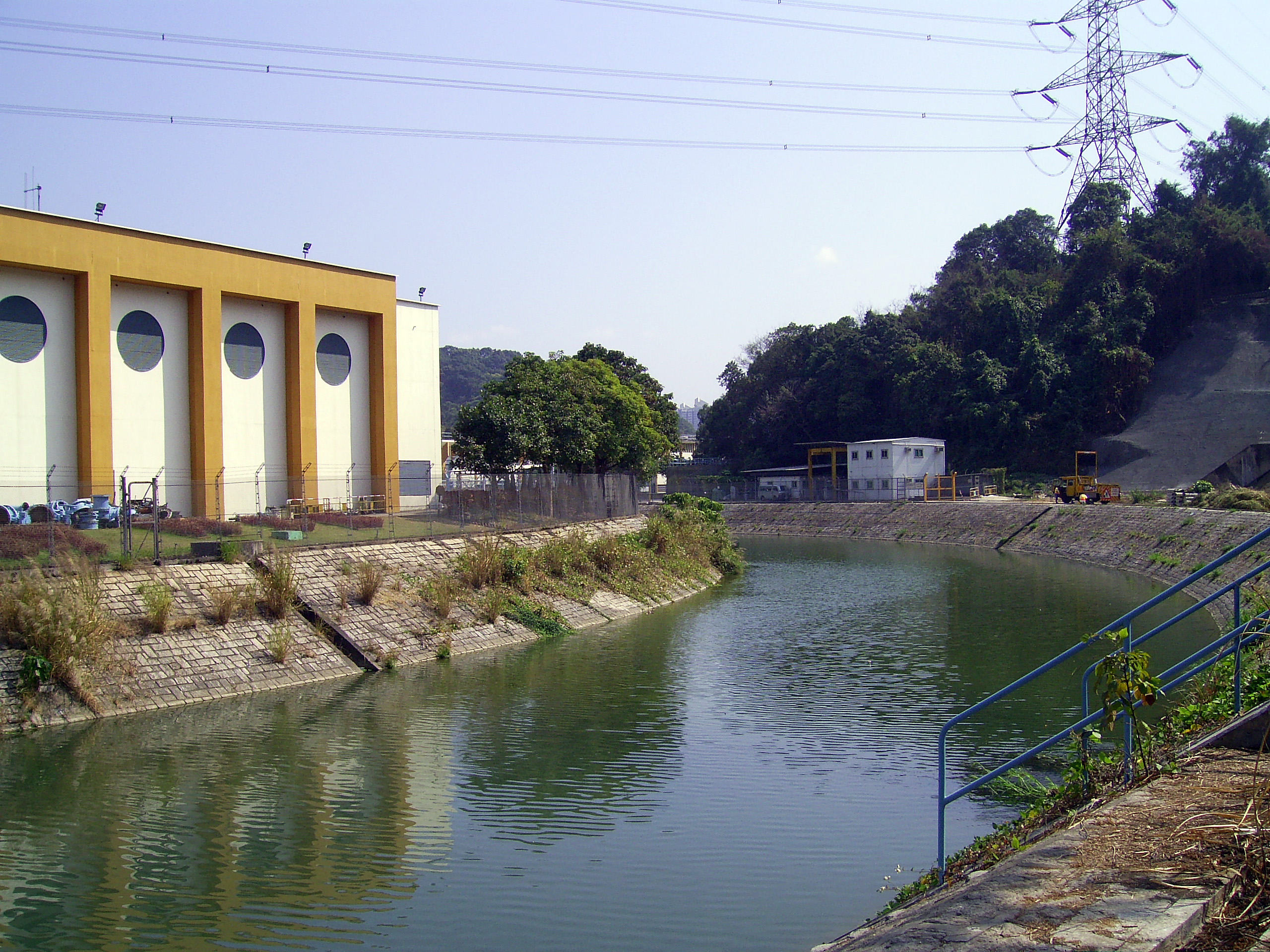 中文（香港）: 大埔頭抽水站一段林村河